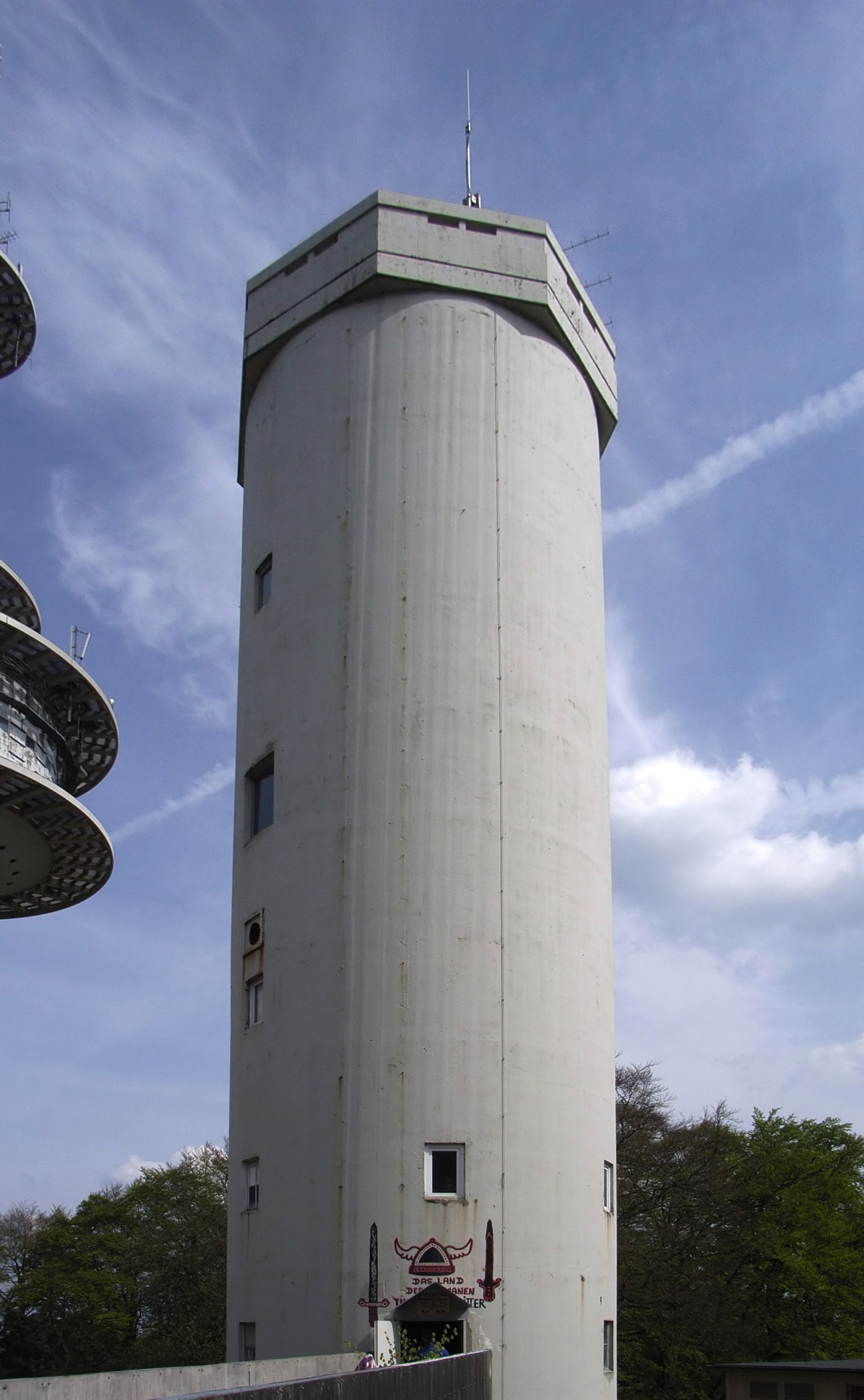 Bielefeld, Deutschland: Ehemaliger Fernmeldeturm (in Betrieb von 1952 bis 1972) inmitten der Hünenburg Bielefeld; heute Aussichtsturm mit Cafe und Museum.